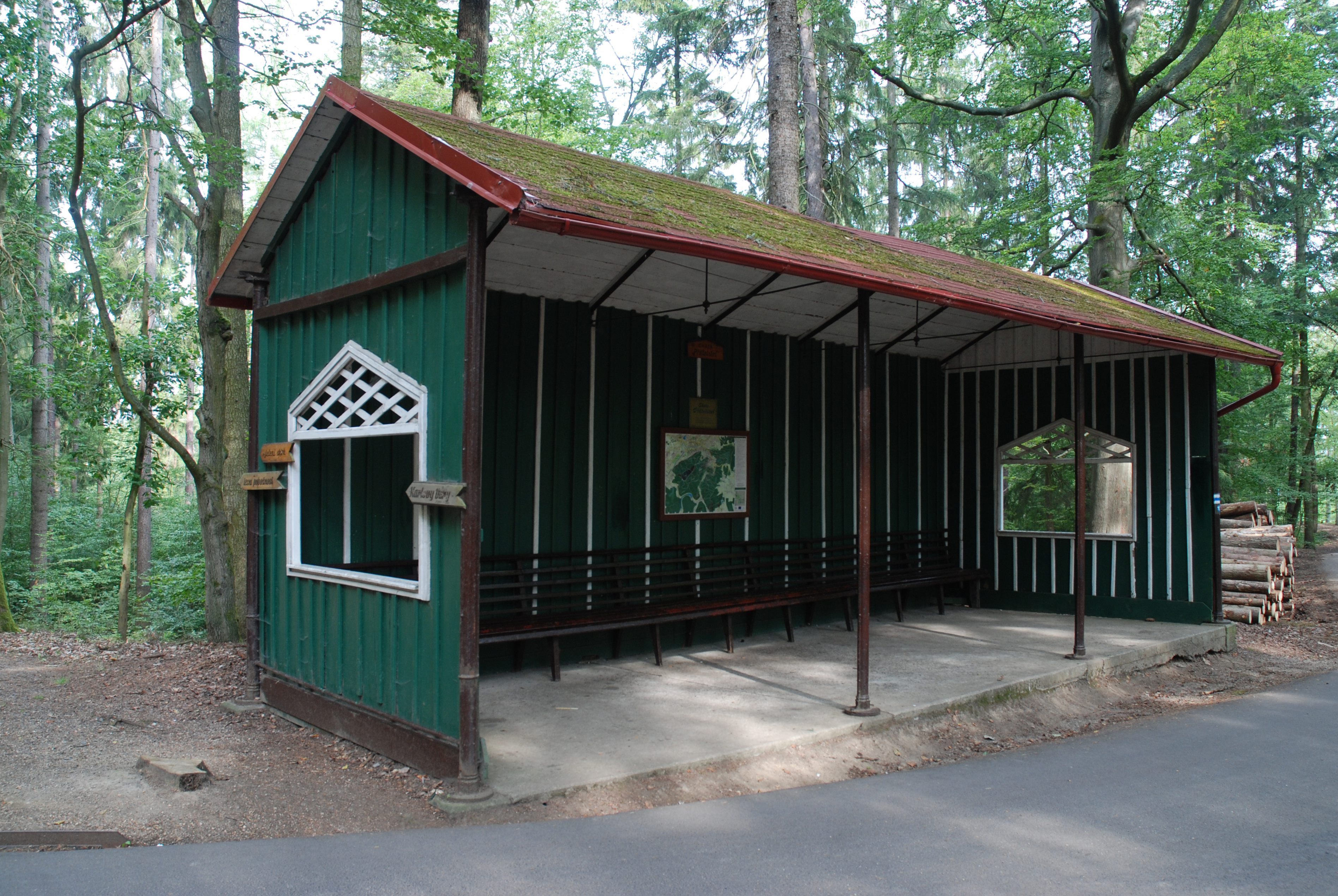 Chata Přátelství u cesty Přátelství v karlovarských lázeňských lesích